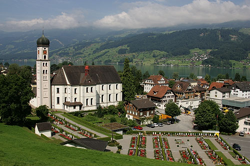 Sachseln: Wallfahrtskirche (Pfarrkirche) und Friedhof